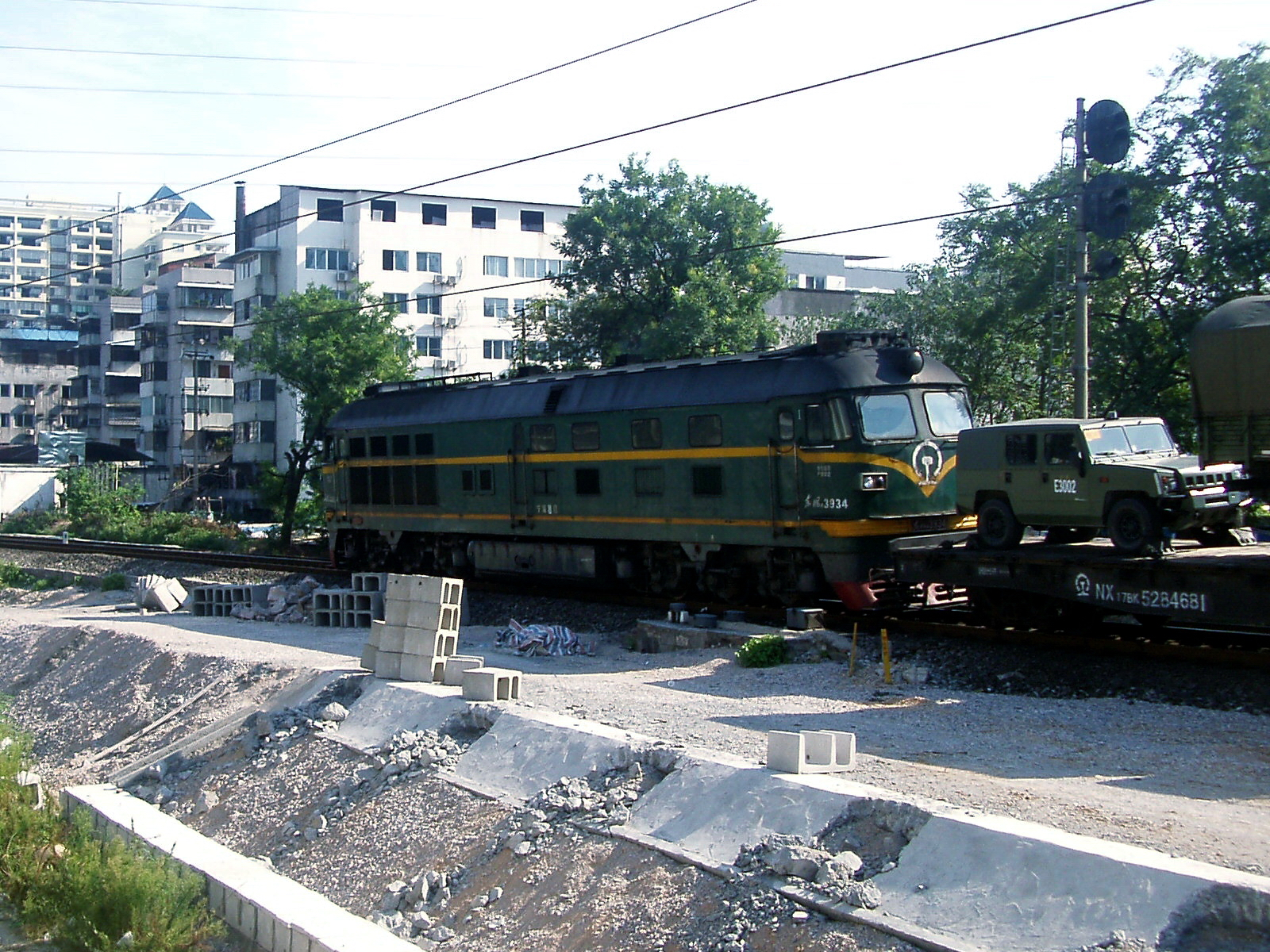 配属于南宁机务段的东风4B型3934号柴油机车牵引军用列车驶入桂林站。当日桂林市内发生反日游行。